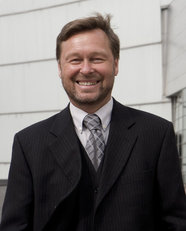 Kiasman entinen johtaja Berndt Arell